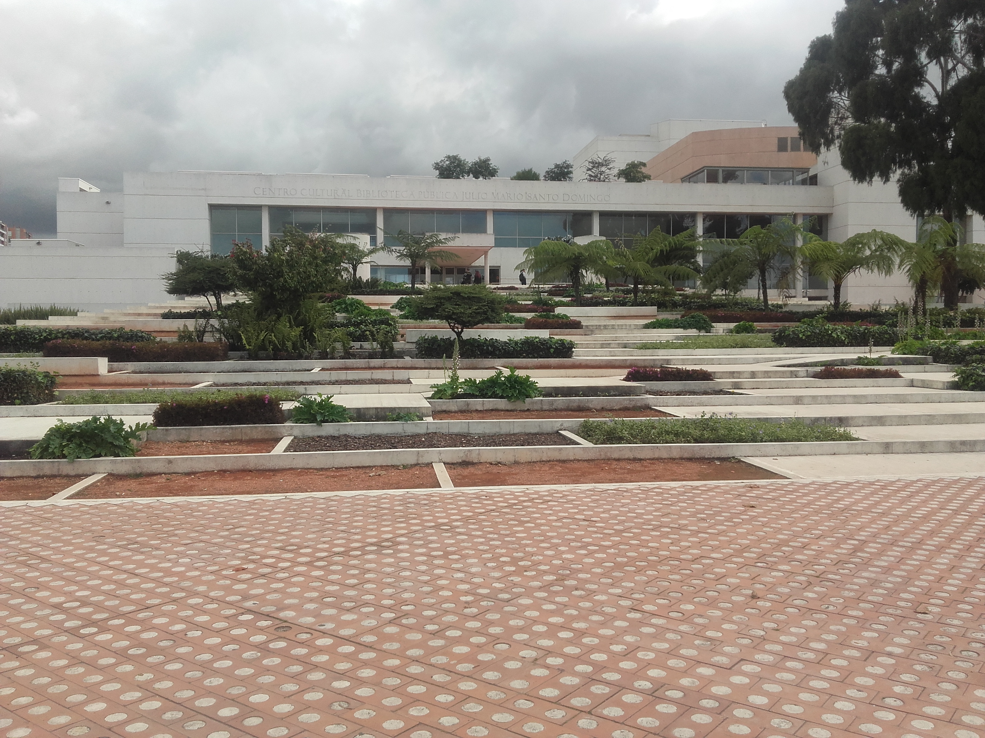 bilikdjfjfjjjfjdjdjd